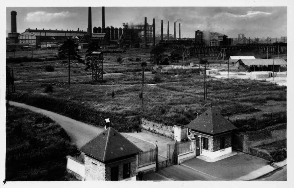 Entrée de la SMN